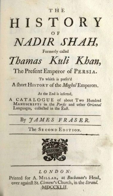 Dies ist ein Buch